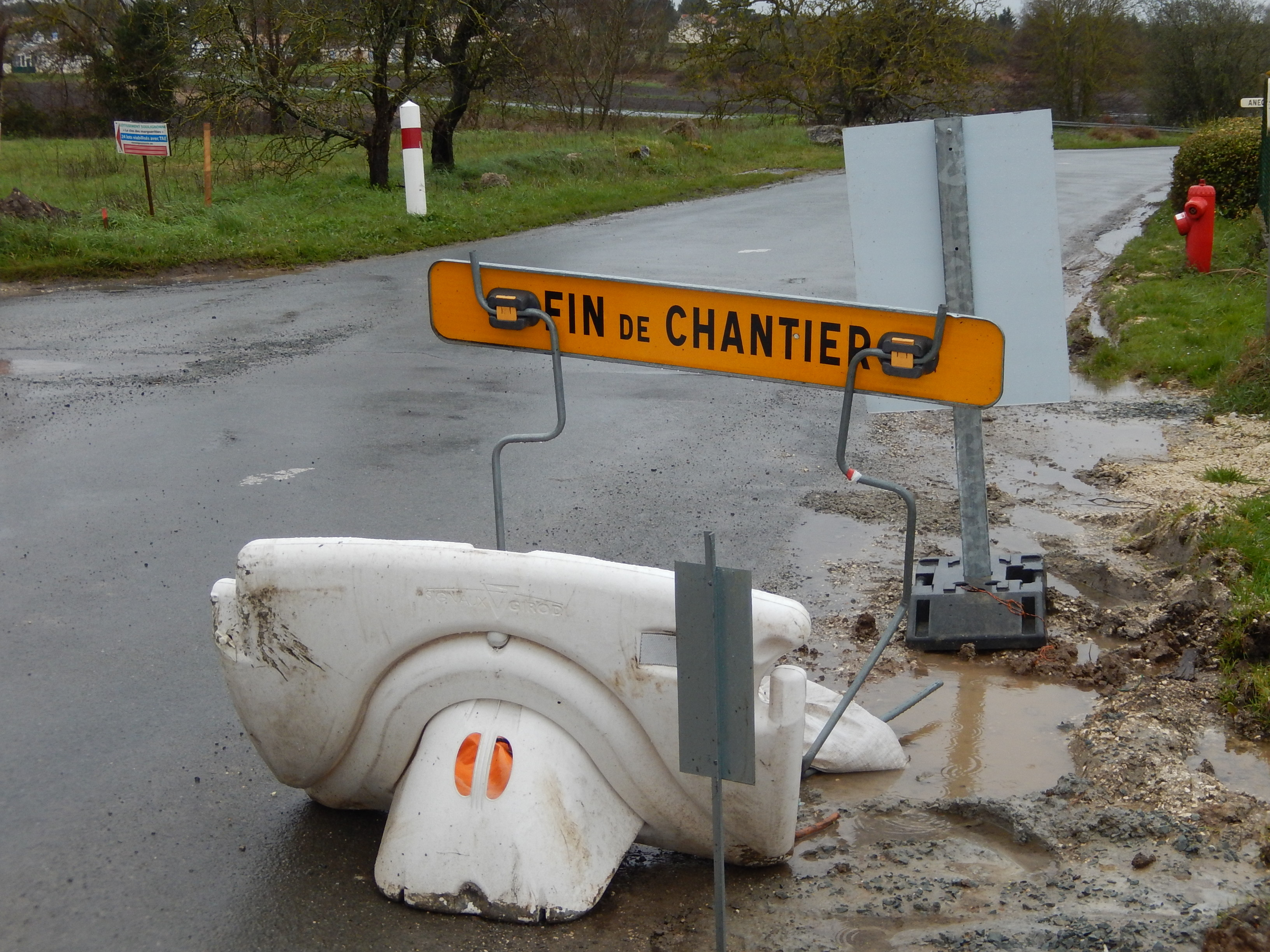 Une balise de délimitation de chantier de type K2 positionnée à Soulignonne, vue côté envers.